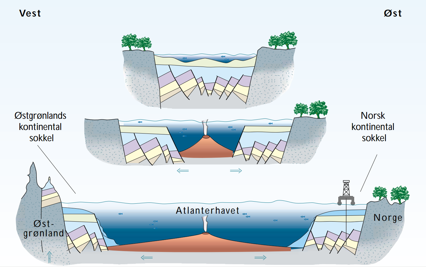 Skematisk udvikling af Atlanterhavet mellem Grønland og Norge, fra Sen Kridt til i dag.